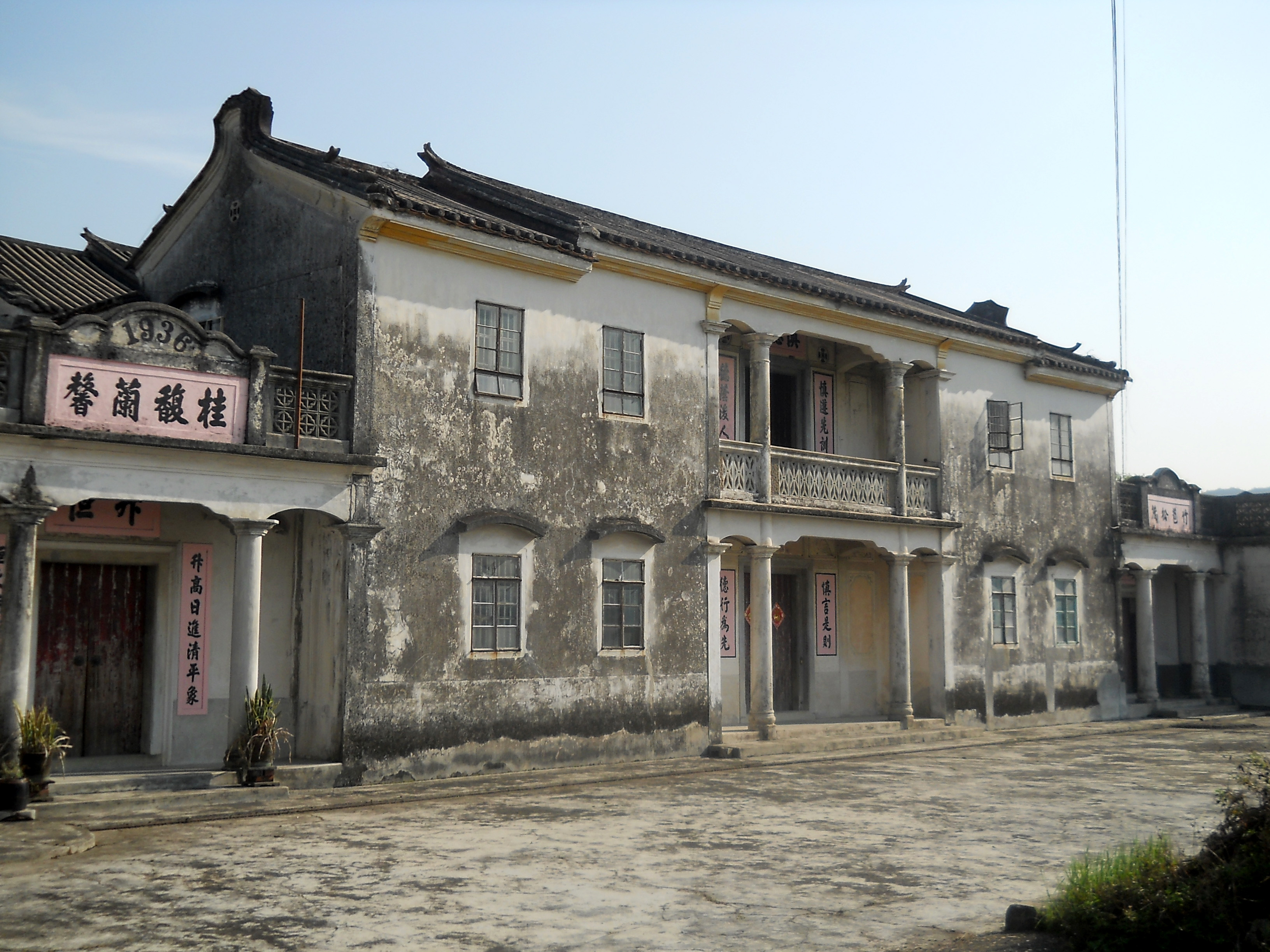 中文（香港）: 慎德居